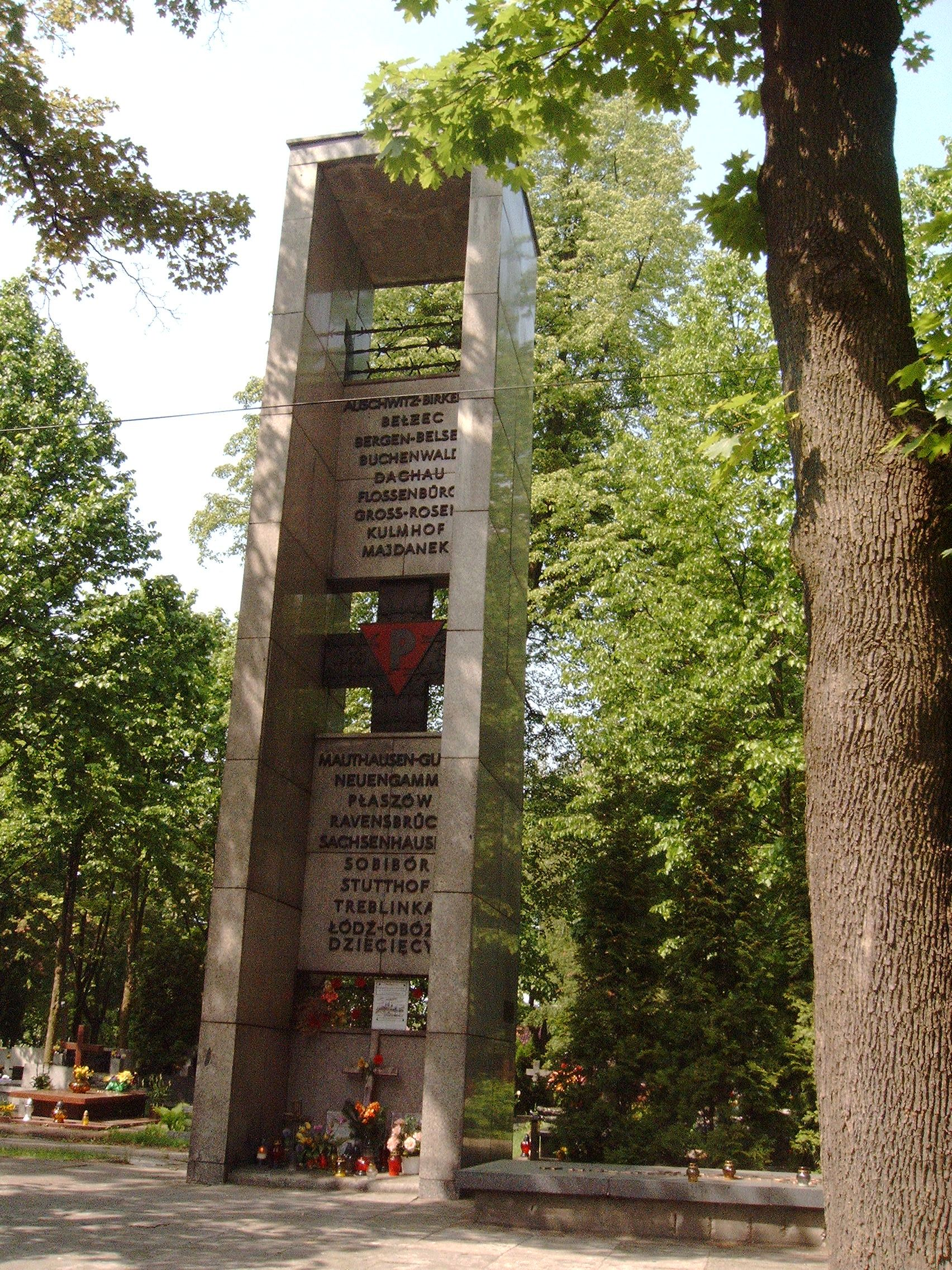 Pomnik ofiar pomordowanych w obozach hitlerowskich na cmentarzu komunalnym na dołach w Łodzi